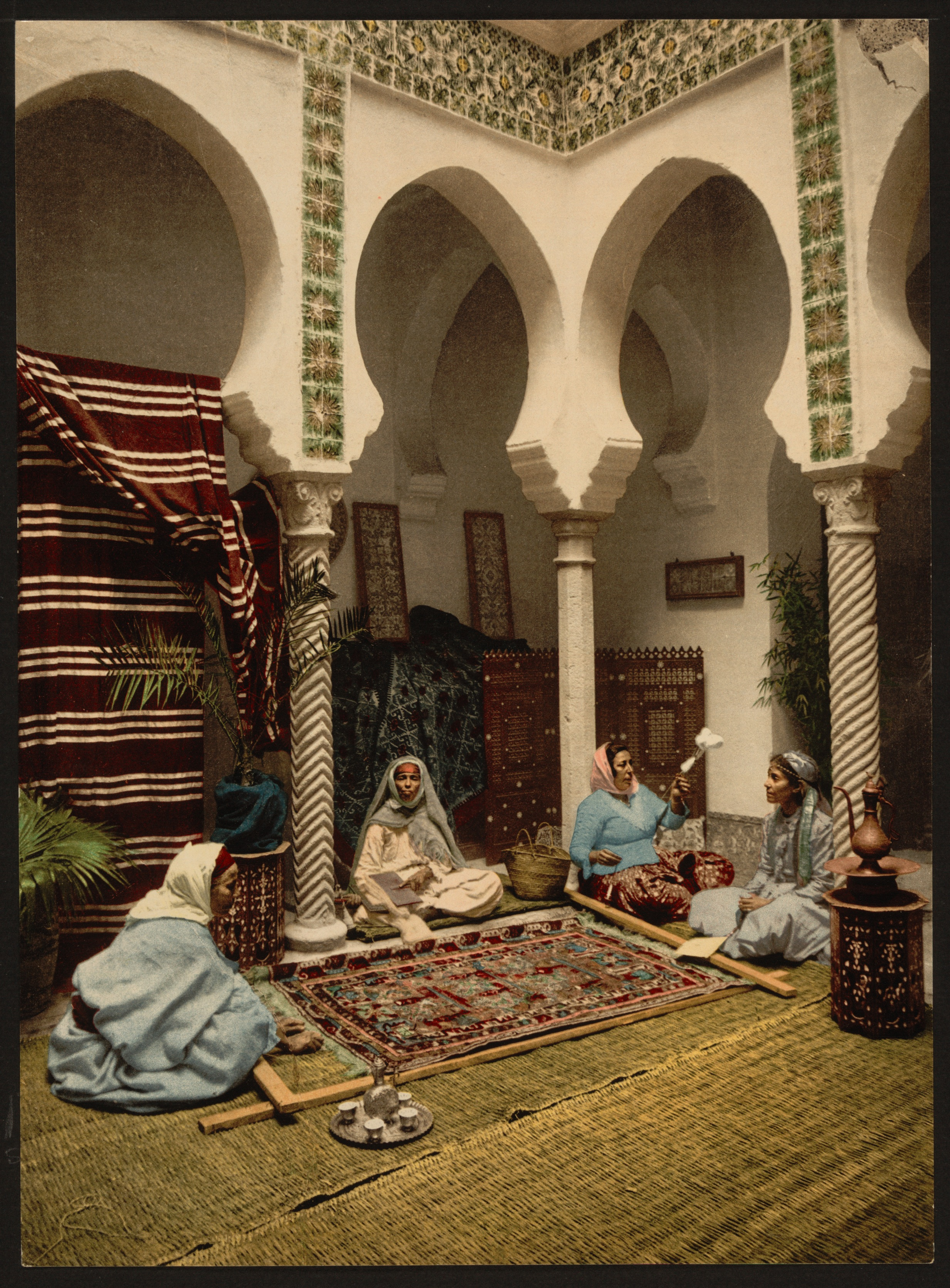 Moorish women making Arab carpets, Algiers, Algeria